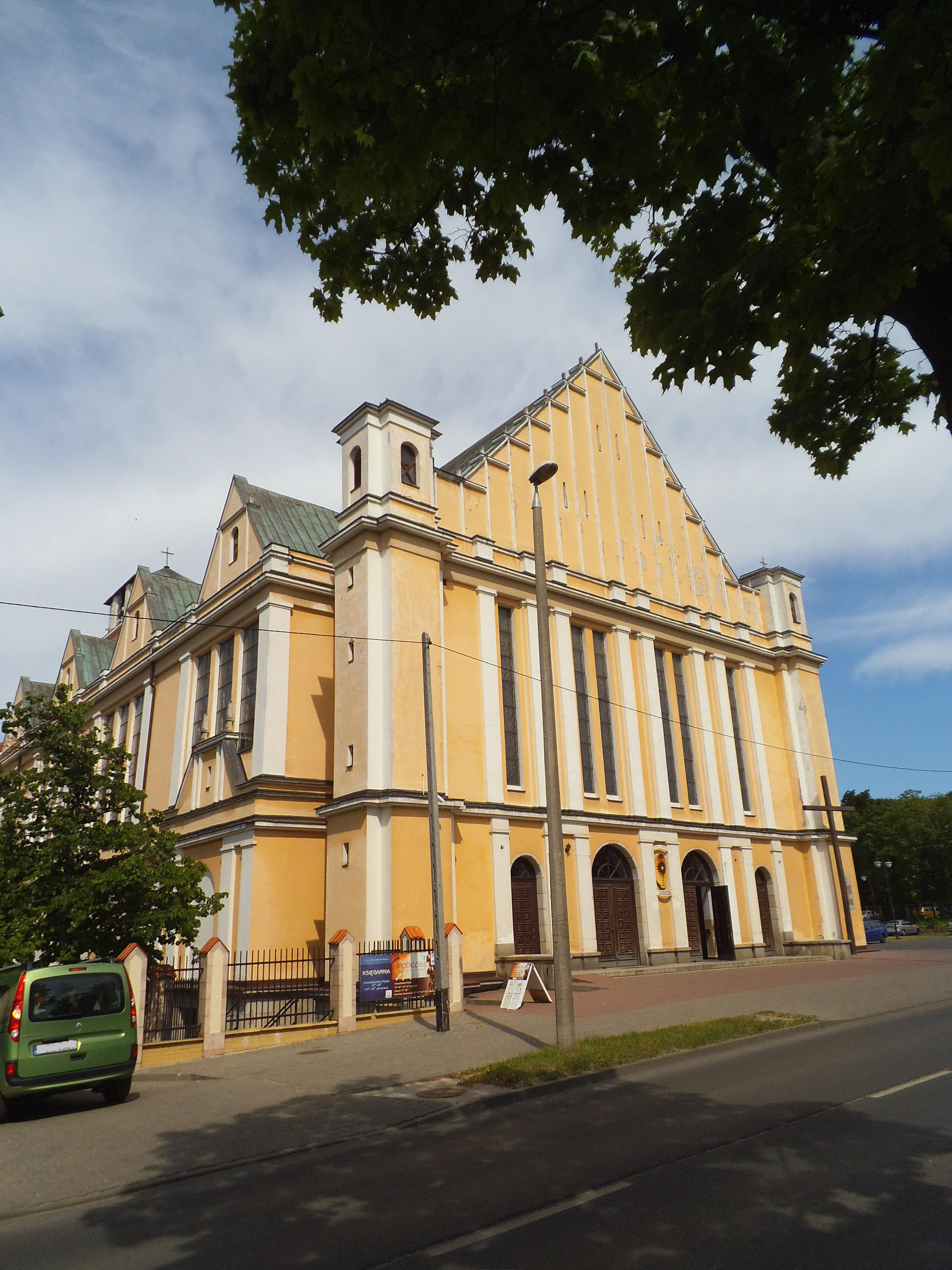 Kościół św. Józefa w Toruniu